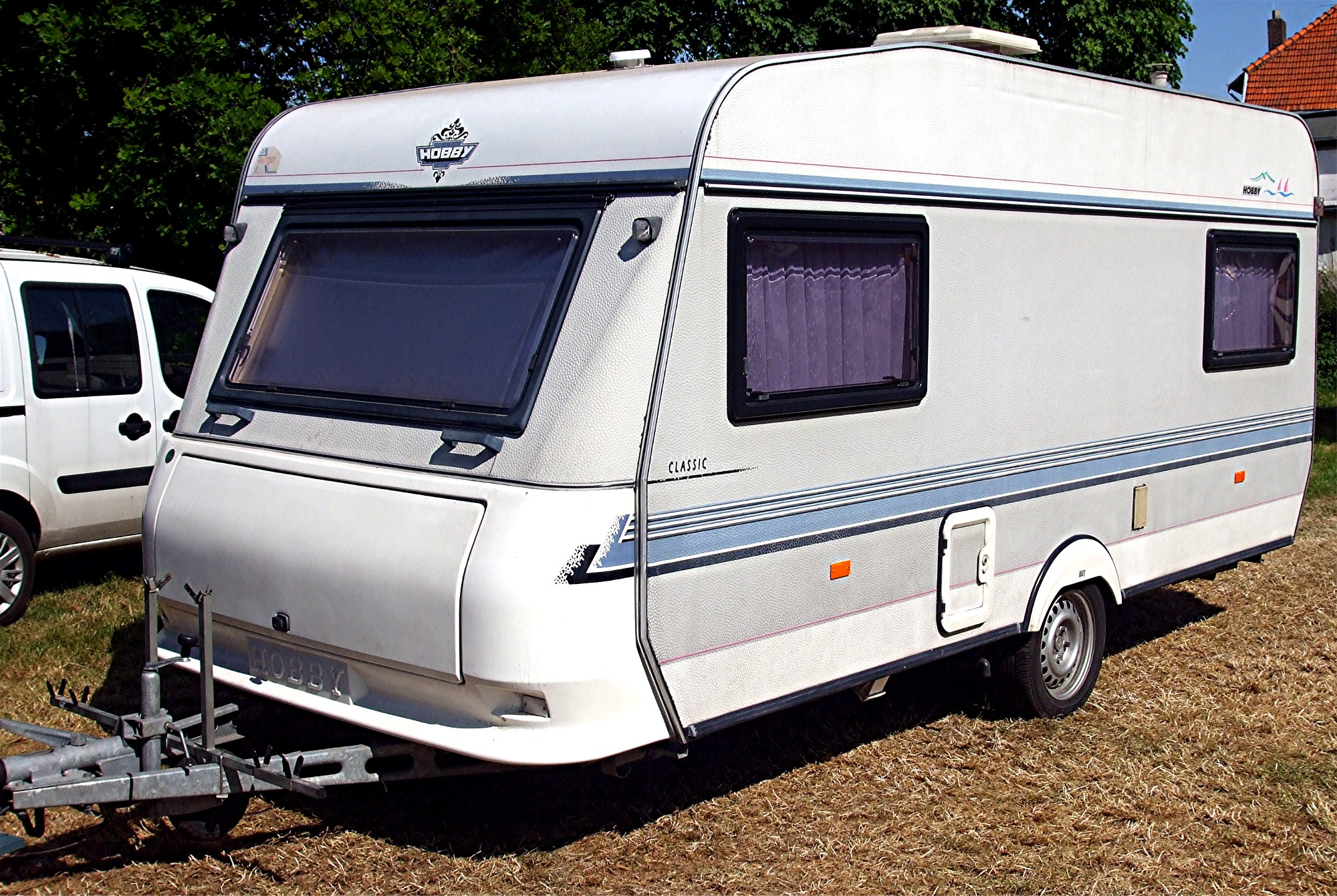 einachsiger Hobby Wohnwagen „classic“